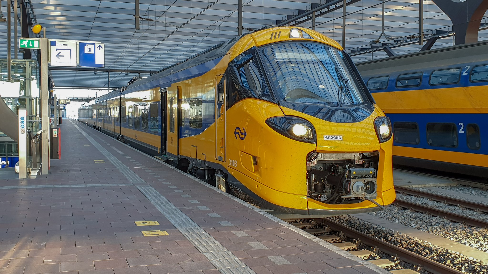 ICNG 3103 op station Rotterdam Centraal op zondag 21 juni 2020